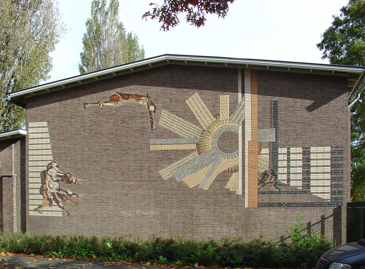 Zonder titel (baksteen, 1964) door Berend Hendriks - Joubertstraat Gouda